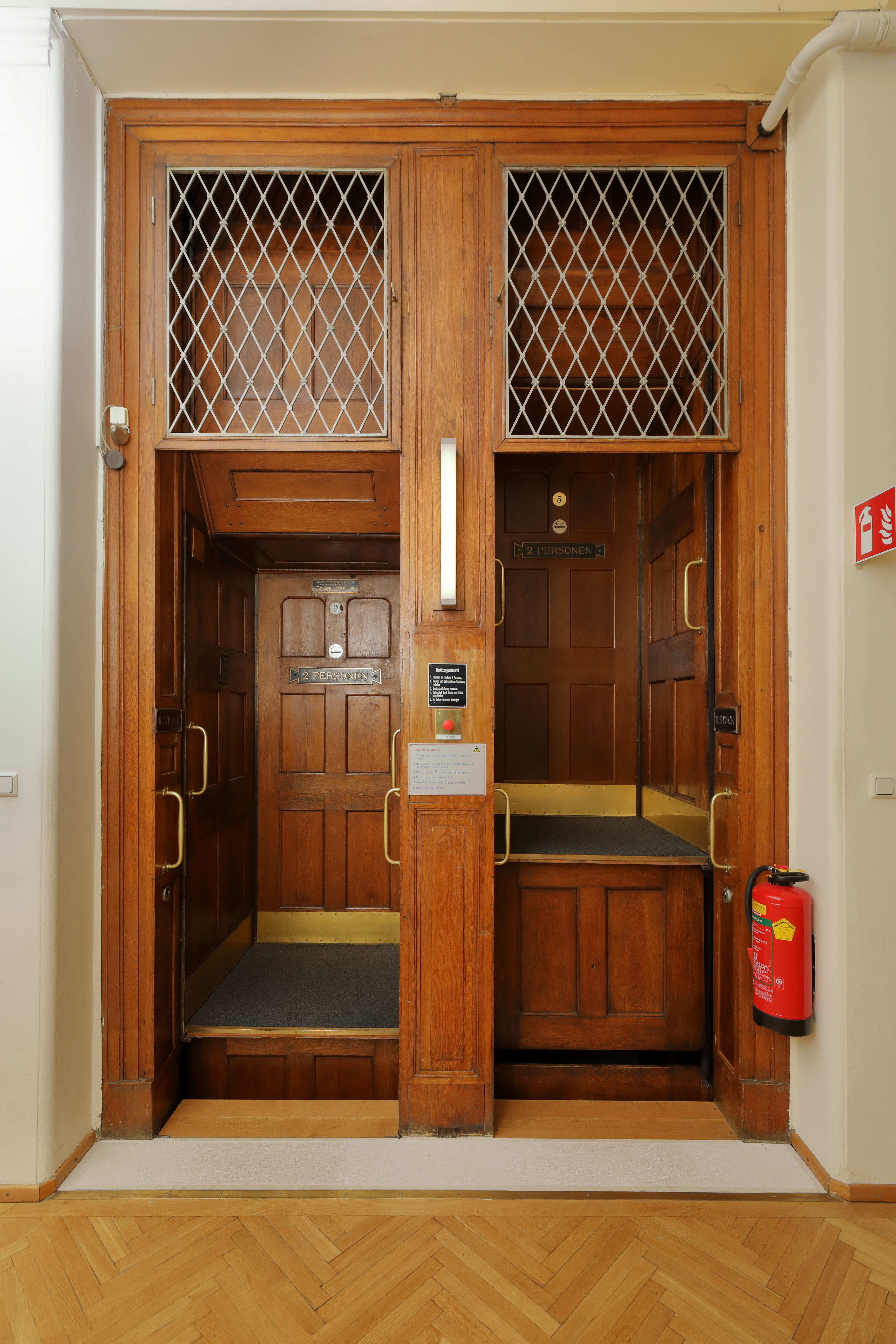 Paternosteraufzug im Haus der Industrie an der Adresse Schwarzenbergplatz 4 im 3. Wiener Gemeindebezirk Landstraße.Der Paternoster wurde von Freissler hergestellt, 1911 offiziell in Betrieb genommen und ist Österreichs ältester in Betrieb befindlicher Paternoster. Die Umlaufgeschwindigkeit der 13 Kabinen beträgt 0,2 Meter pro Sekunde. Aufnahme stammt nicht aus dem Erdgeschoss.